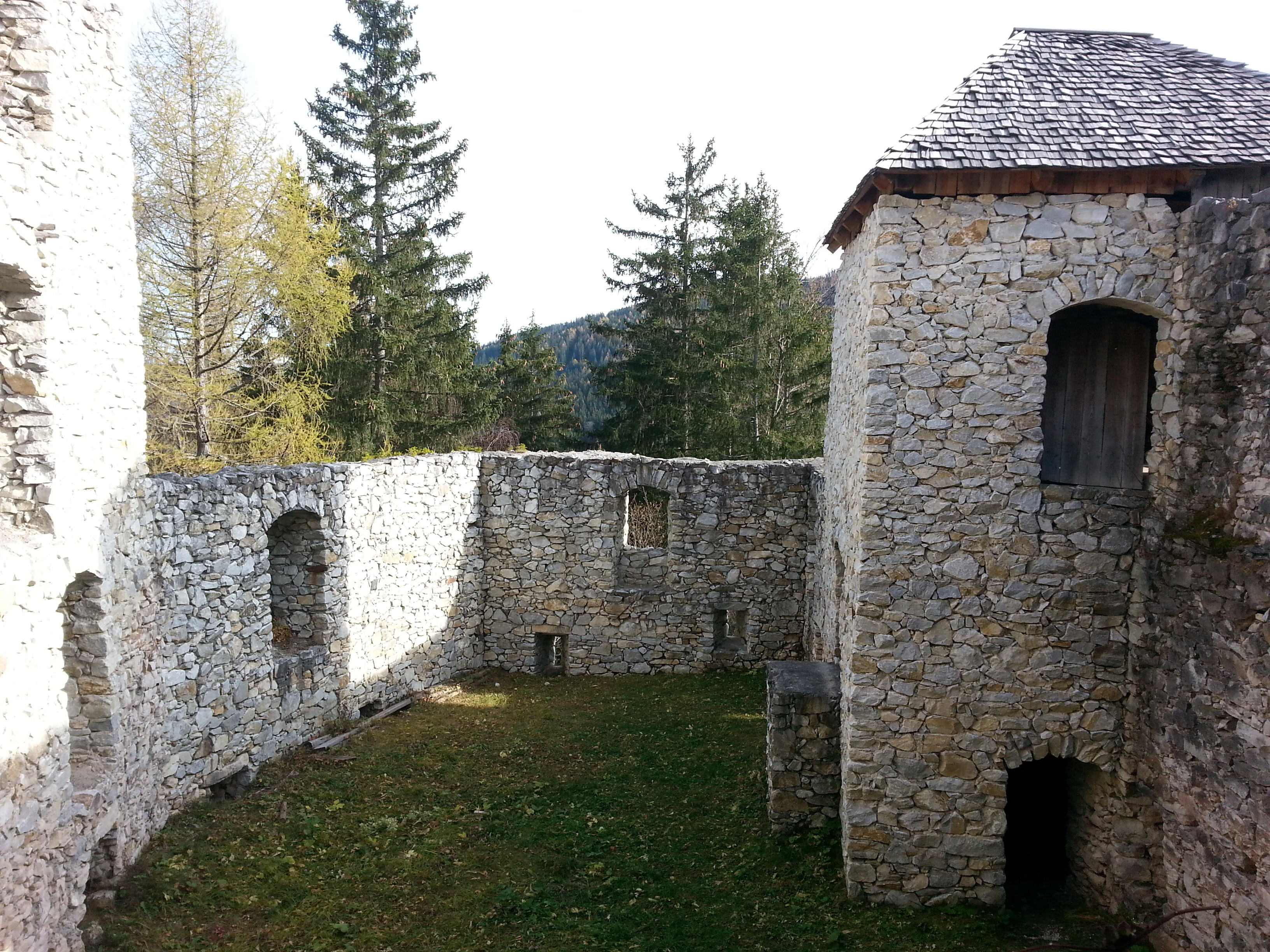 Der Innenhof der Burg Klingenstein vom Bergfried aus gesehen, Steiermark